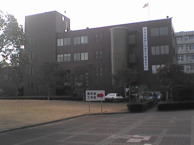 Vue de l'université de Miyazaki.